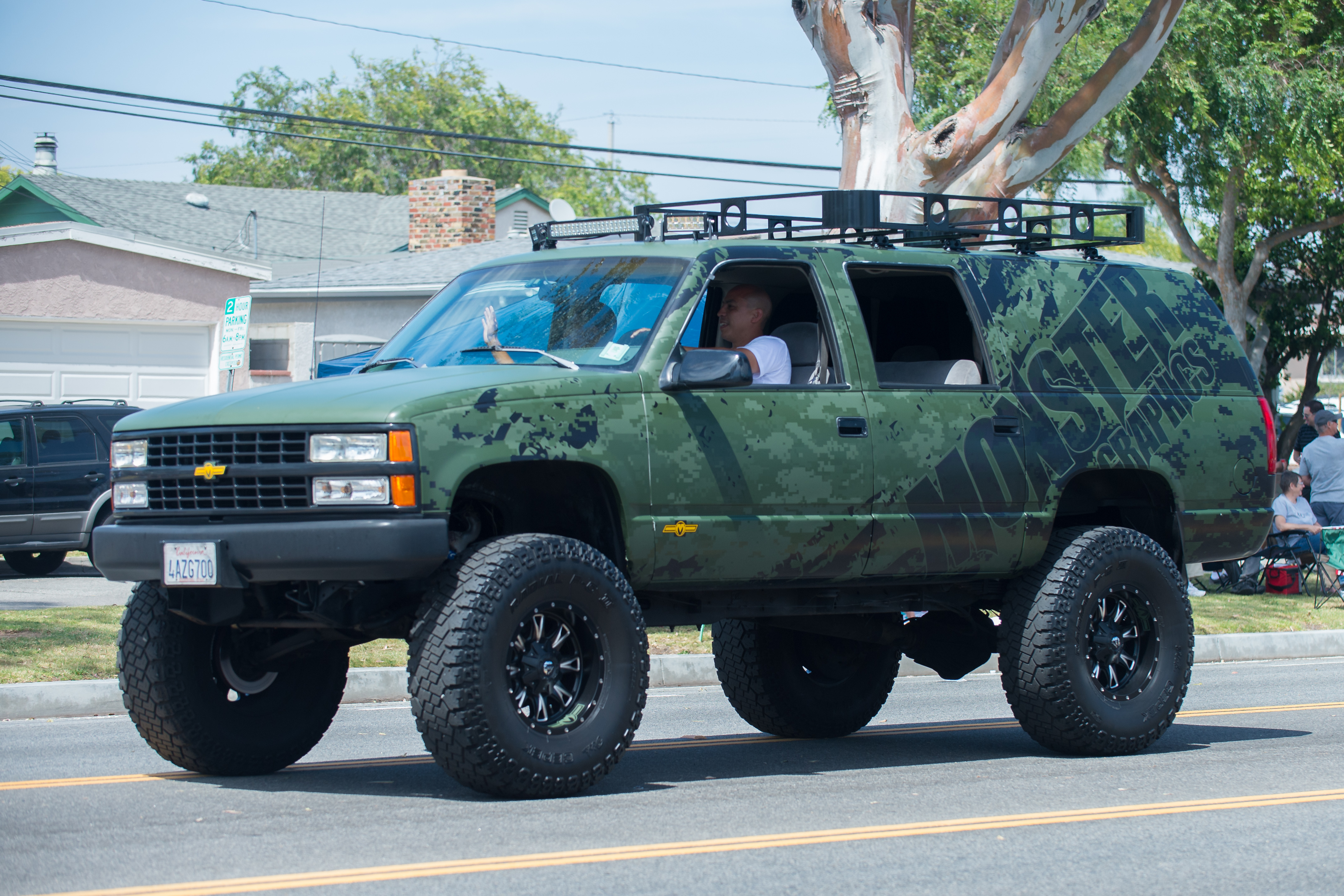 Los Alamitos CA